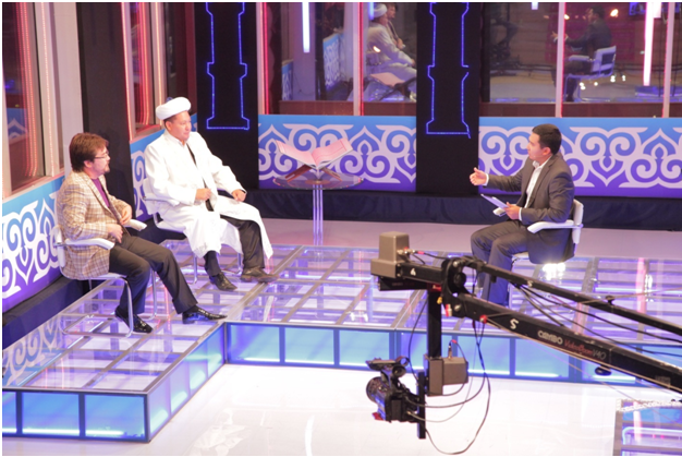 Ардақ Байғабыл